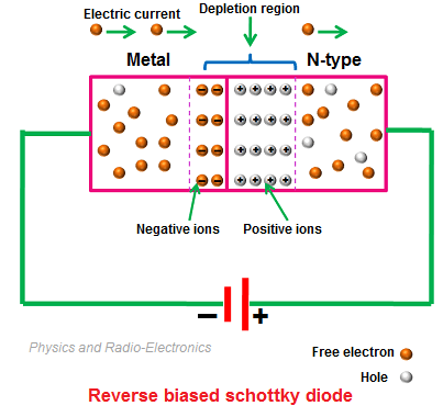 Schottky dioodi tööpõhimõte